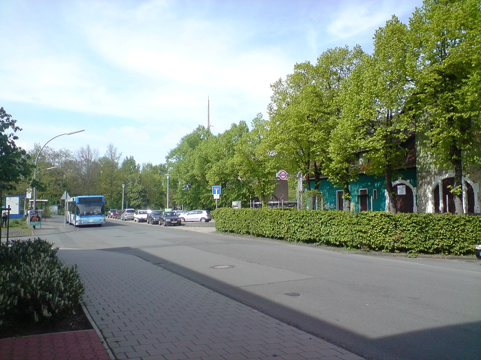 Bahnhof Münster-Hiltrup, Vorplatz mit Bushaltestelle, Parkplatz und Fahrradstation